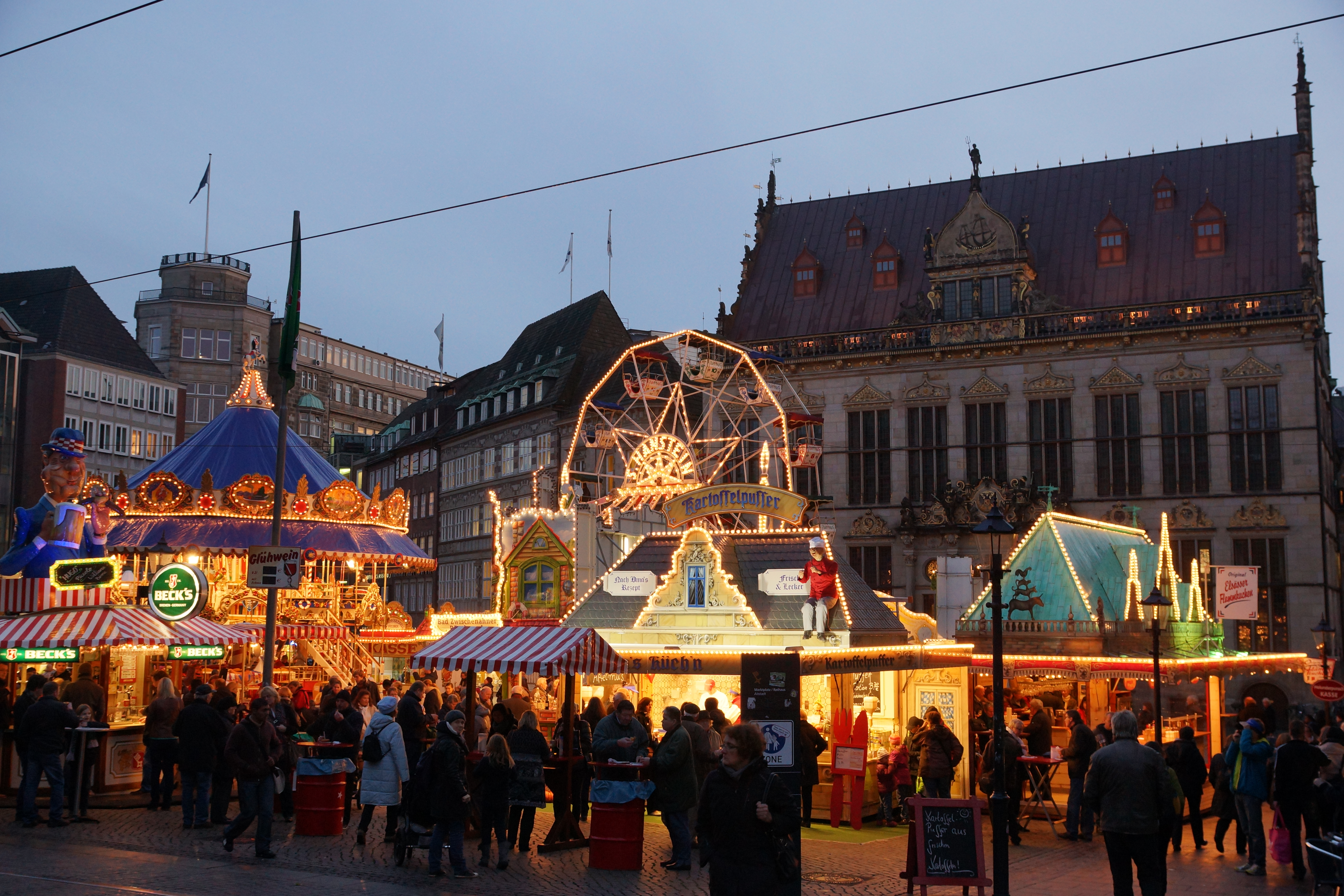 Kleiner Freimarkt auf dem Bremer Marktplatz. Im Hintergrund rechts der Schütting.